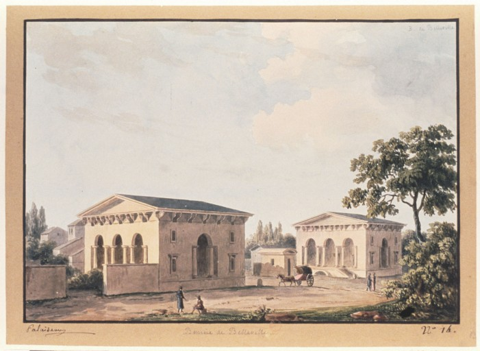 La barrière de Belleville